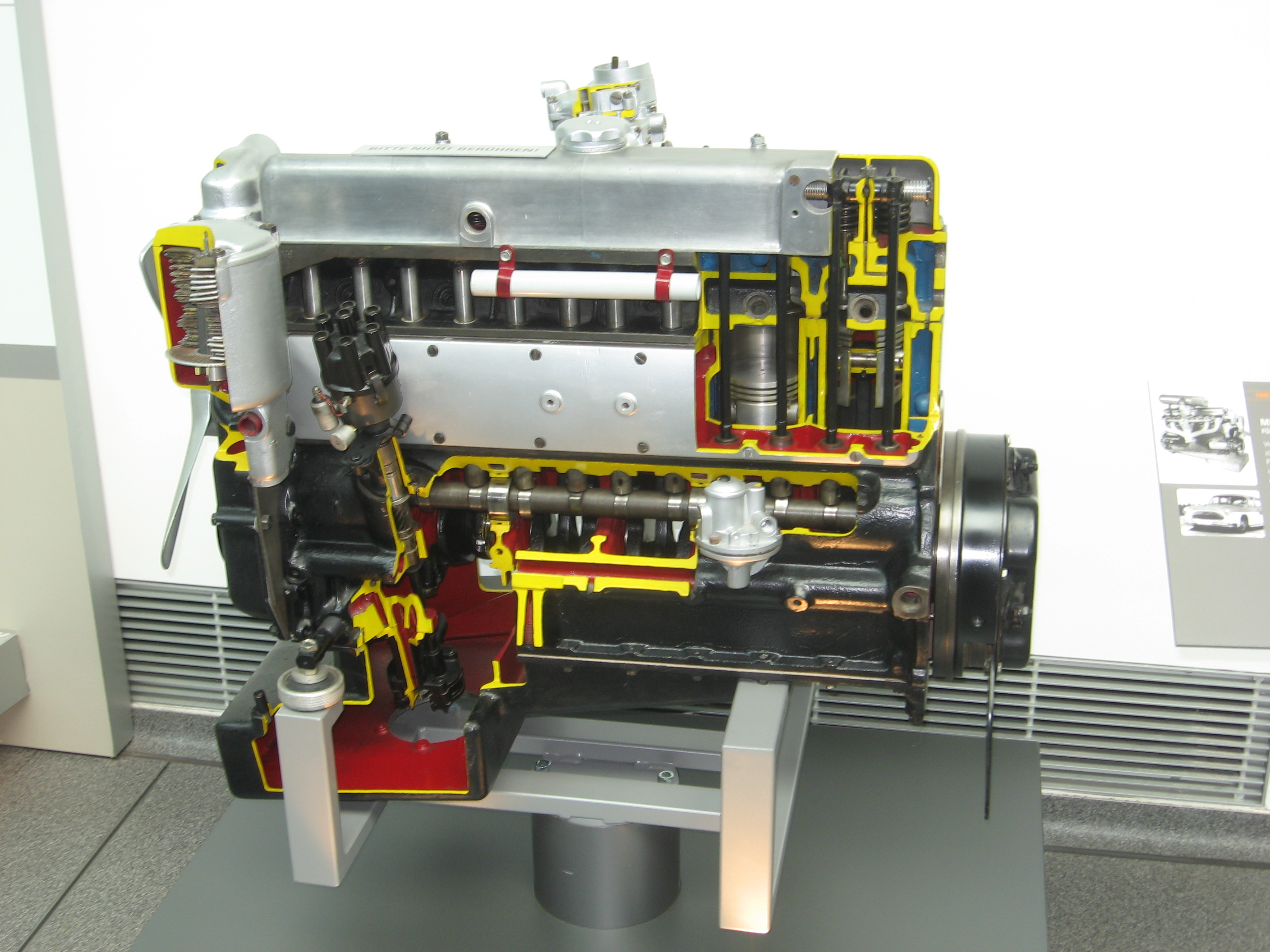 Sachsenring/Horch OM-6 Motor, August-Horch-Museum Zwickau (Germany)